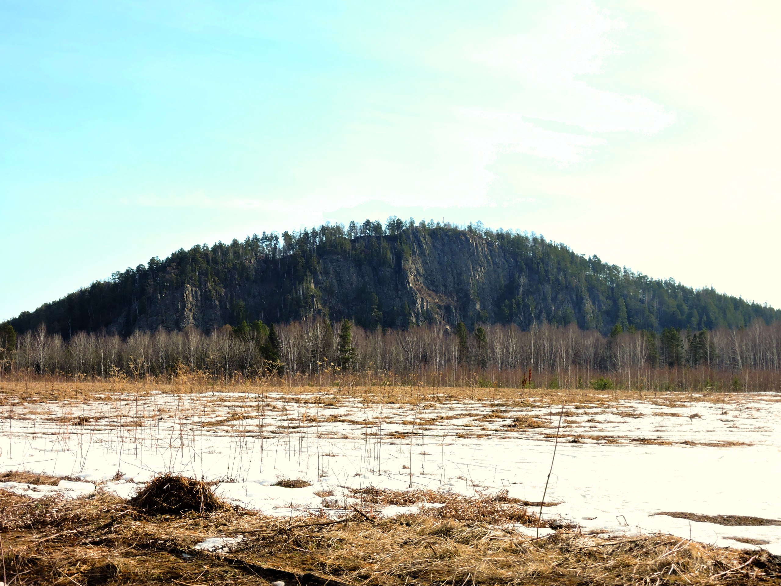 Гора "Медведь-камень" (Ермаково городище) с окружающими лесами", Нижний Тагил This image is related to the protected area of Russia number 6610447